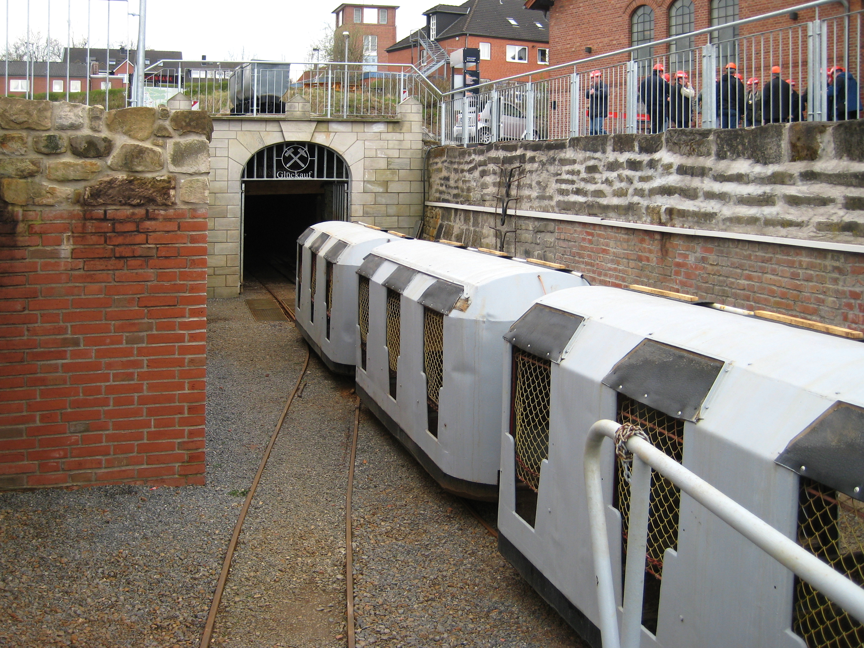 Besucherbergwerk Klosterstollen in Barsinghausen Kleinbahn